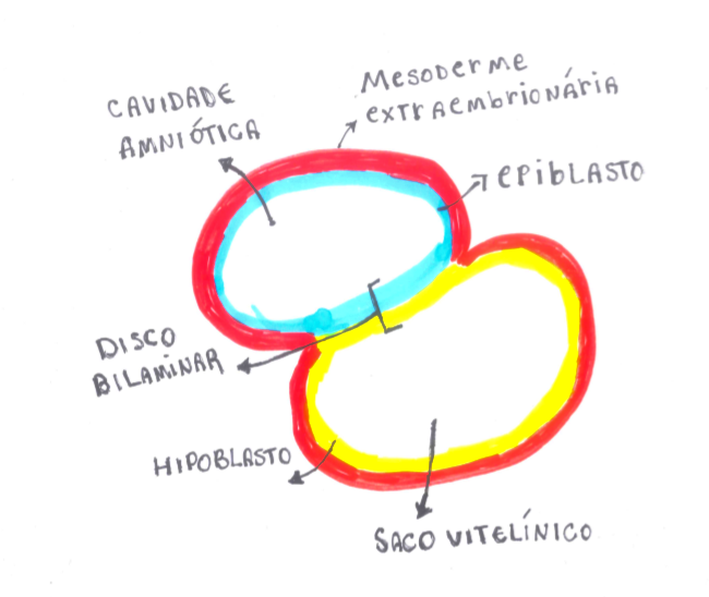 Disco embrionário bilaminar com representação do epiblasto e hipoblasto.